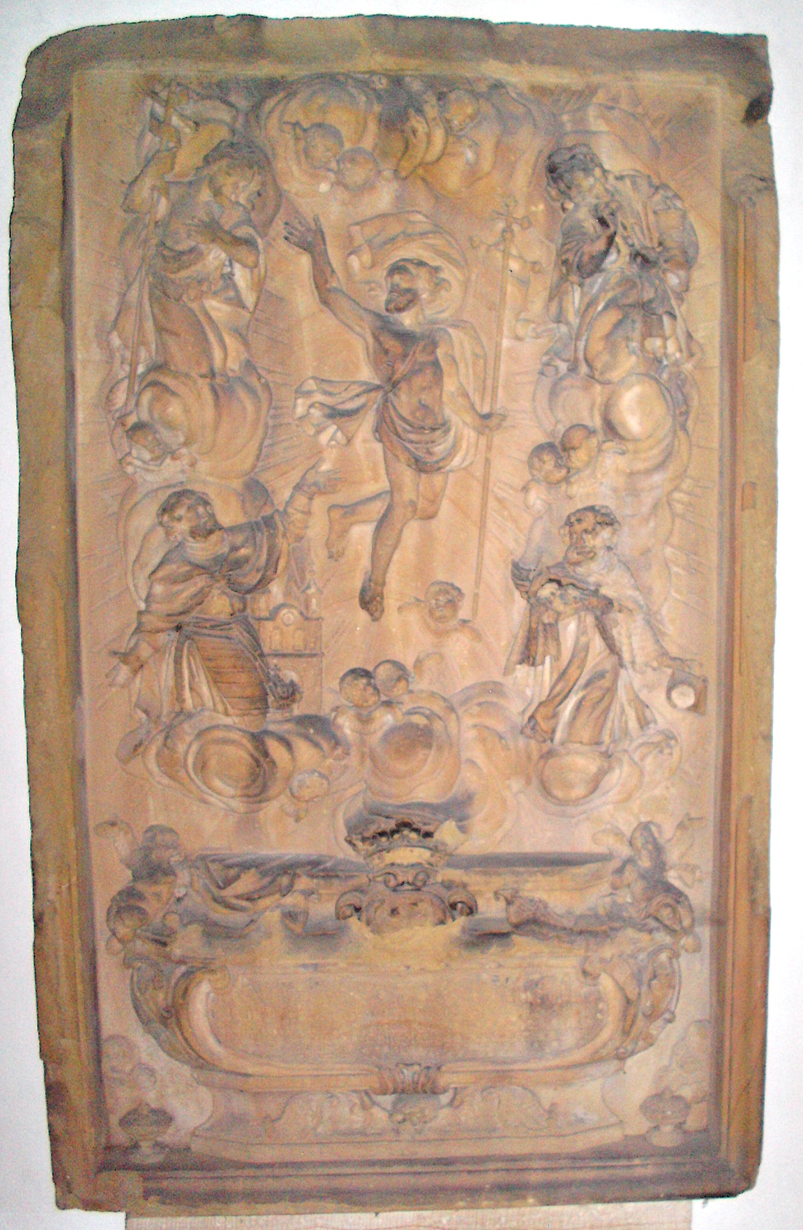 Epitaph des Domdekans Johann Heinrich von Gysenberg (+ 1717), Speyerer Dom